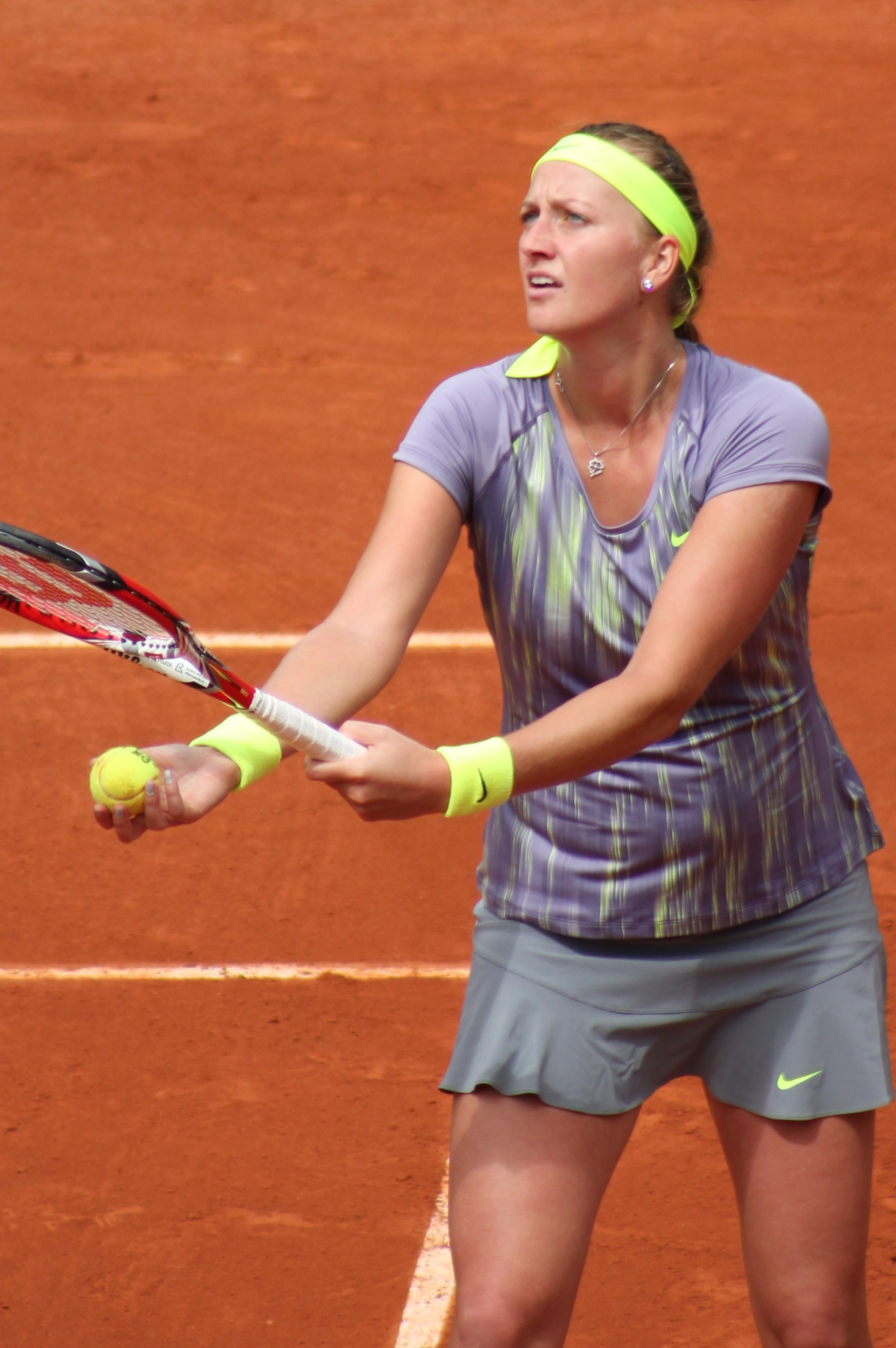 Kvitova RG13 (7)